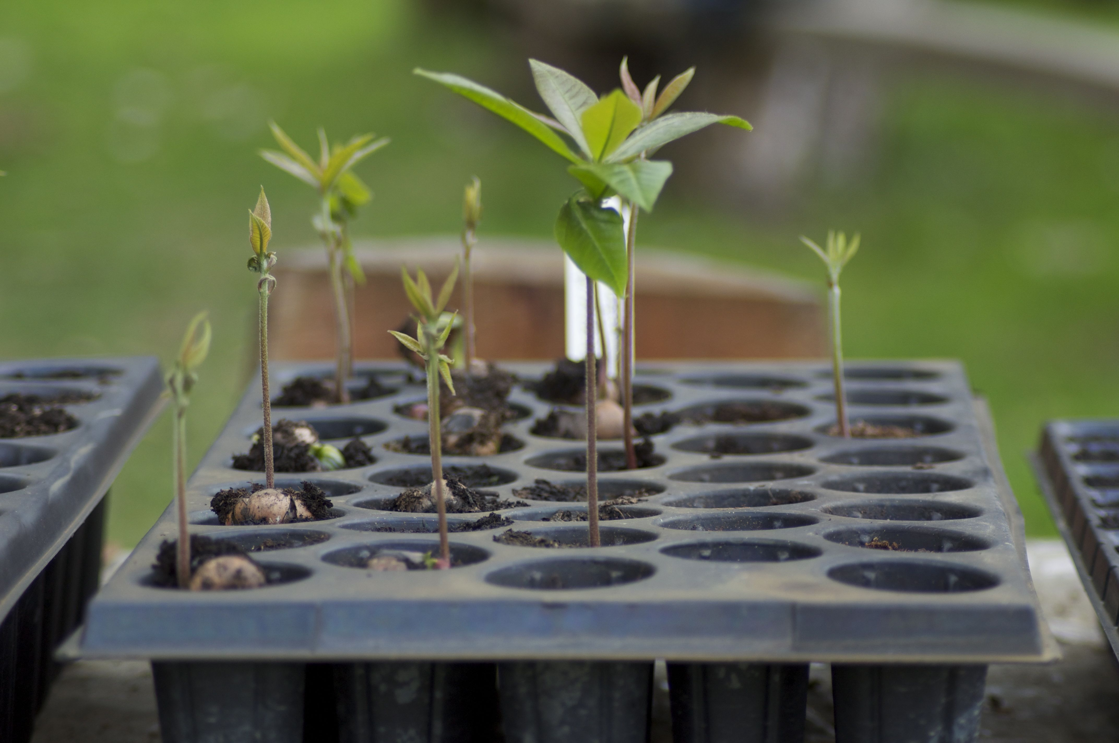 El crecimiento de las plántulas sigue la dirección de la fuente lumínica (en este caso ubicada arriba de las plántulas)